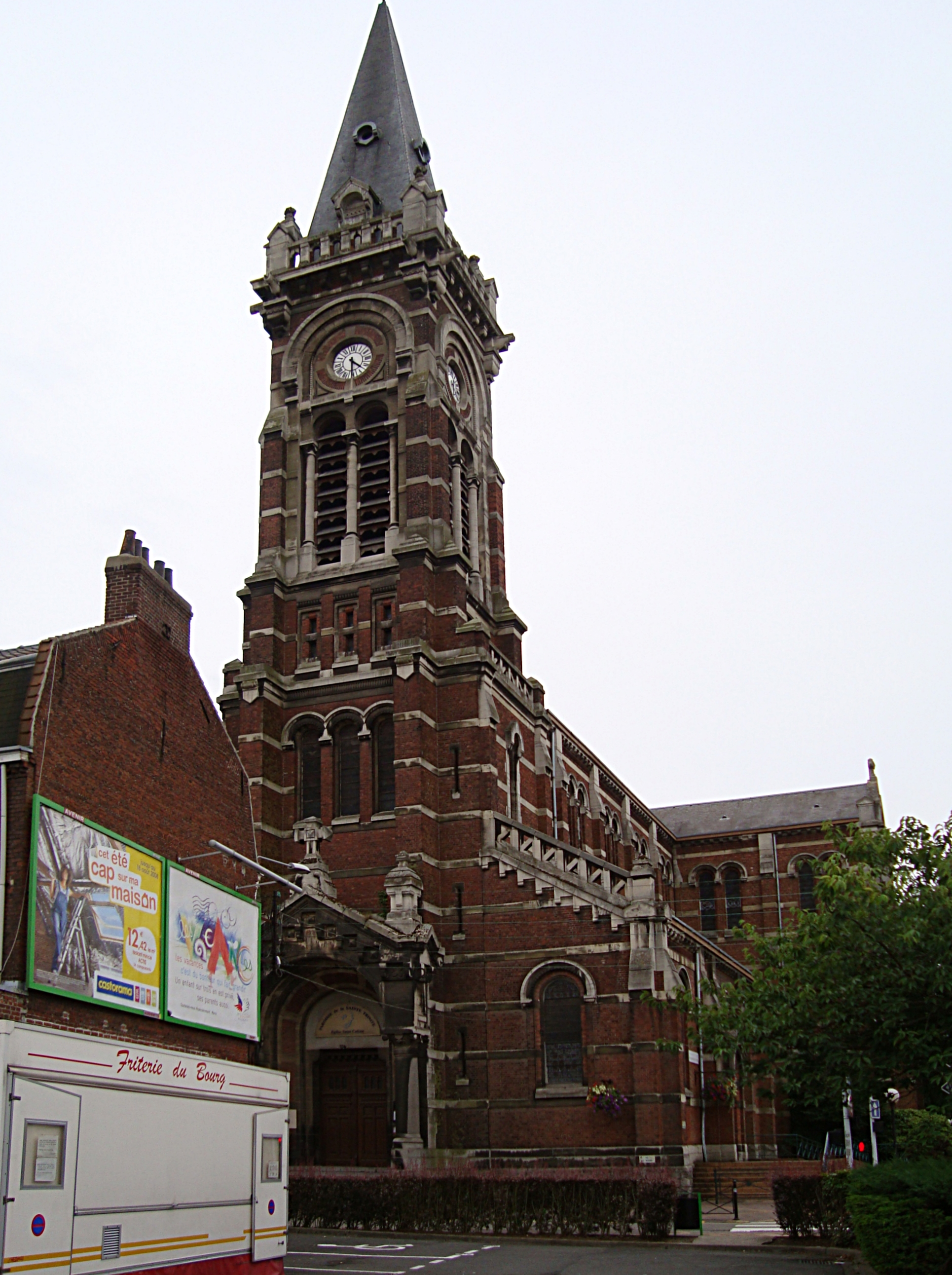 Eglise Saint-Calixte à Lambersart